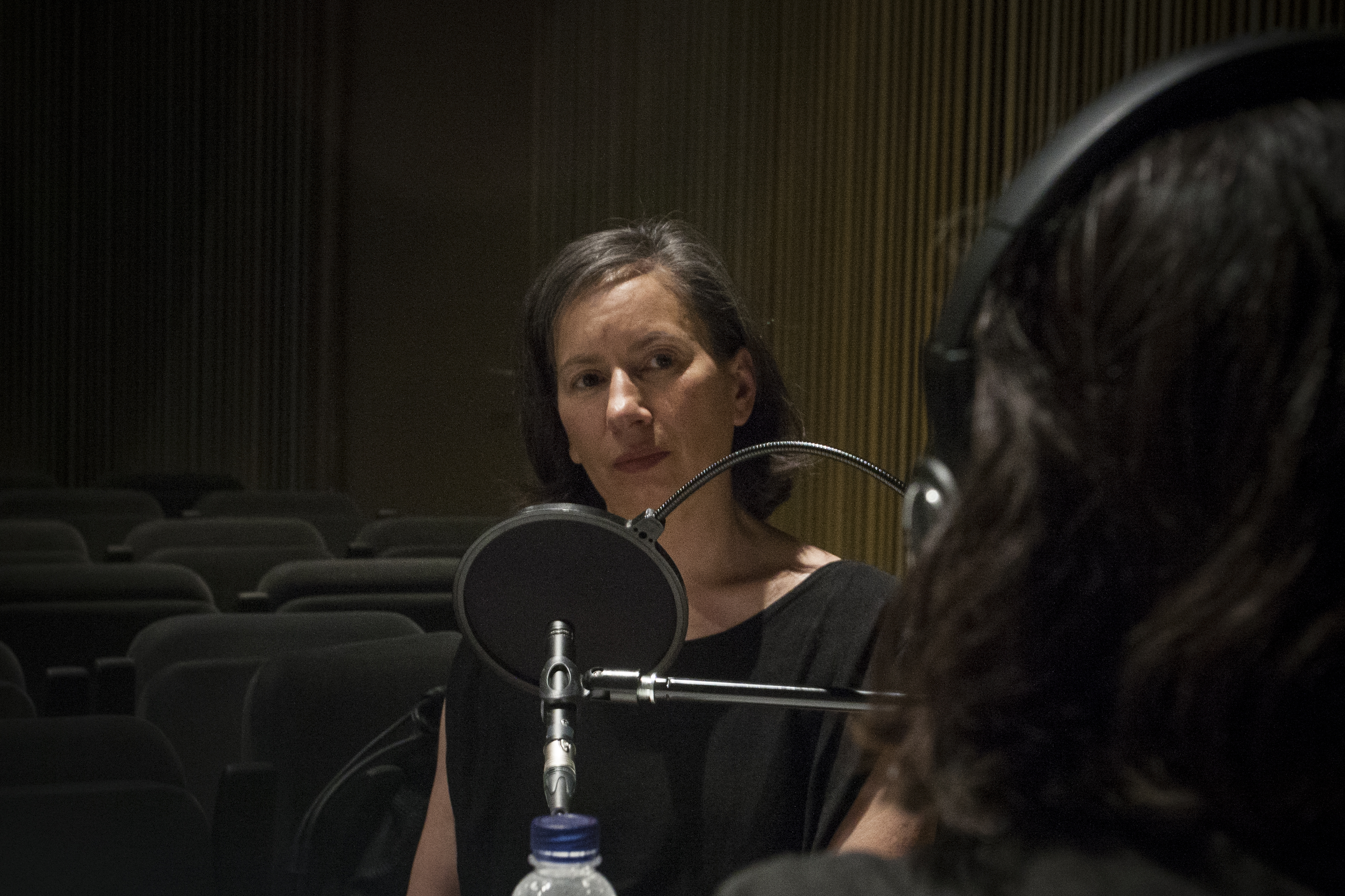 L’artista conversa amb Ràdio Web MACBA arran de la mostra que el museu li dedica actualment. La seva obra es considera una de les més destacades en l’àmbit de la crítica institucional, que en el seu cas s’estén també a la resta d’agents de l’art, com ara galeristes, col·leccionistes i al mateix grup d’artistes del qual ella forma part. Foto: Gemma Planell / MACBA, 2016.